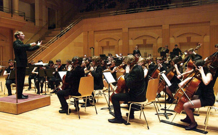 Concert de l'Orchestre symphonique du concervatoire de Metz à l'Arsenal, sous la direction de Aurélien Azan-Zielenski